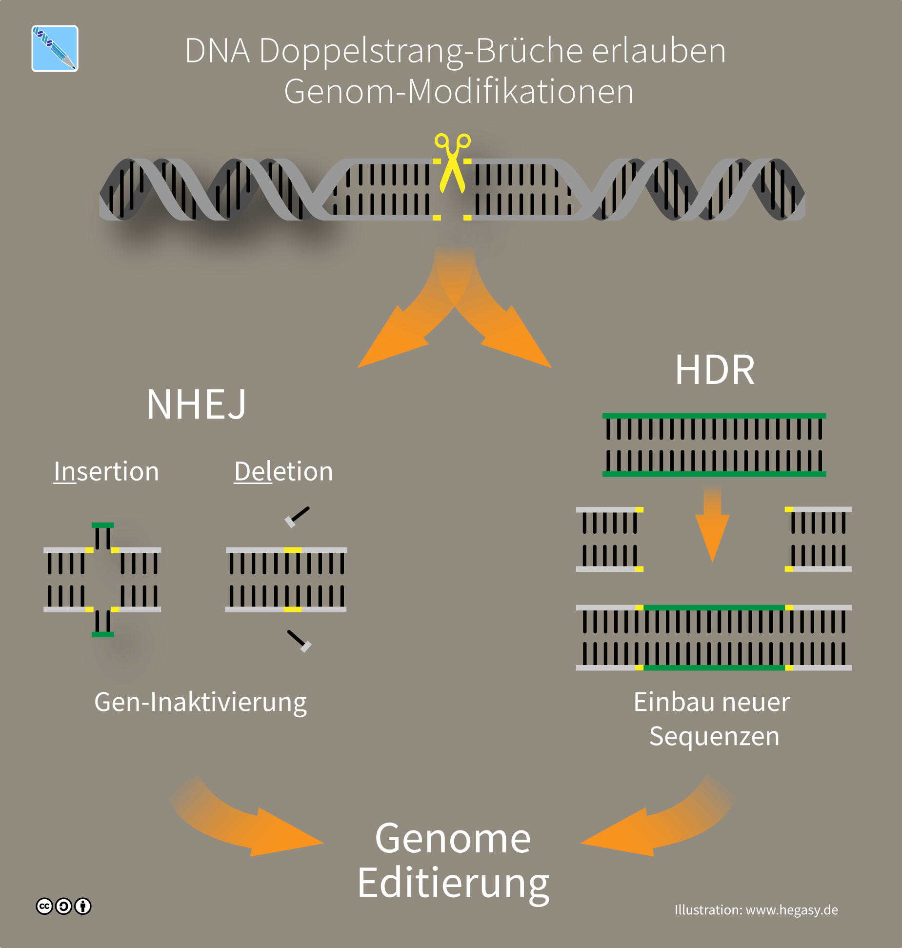 Zelluläre Reparaturmechanismen von DNA-Doppelstrangbrüchen eröffnen den Weg zu genetischer Manipulation. Doppelstrang-DNA Brüche können mittels "Non Homologuous End Joining" (NHEJ) oder "Homolgy Directed Repair" (HDR) repariert werden. Beim NEHJ kann es zu Insertionen oder Deletionen von Basen kommen (Indel-Mutationen). Dadurch können Gene in Ihrer Funktion zerstört werden. Beim HDR kann ein DNA-Vorlage eingebaut werden, wodurch neue Sequenzen ins Genom eingeschleust werden können. Beide Wege können zur gezielten Manipulation am Erbgut benutzt werden.